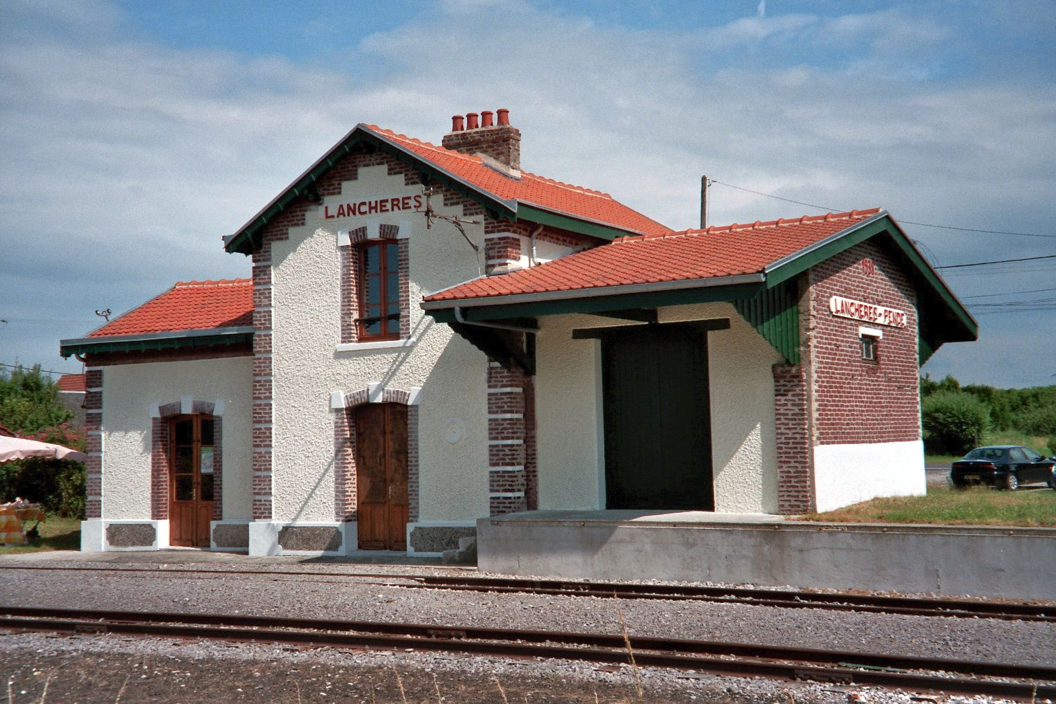 Le bâtiment-voyageurs restauré de Lanchères-Pendé, côté voies.